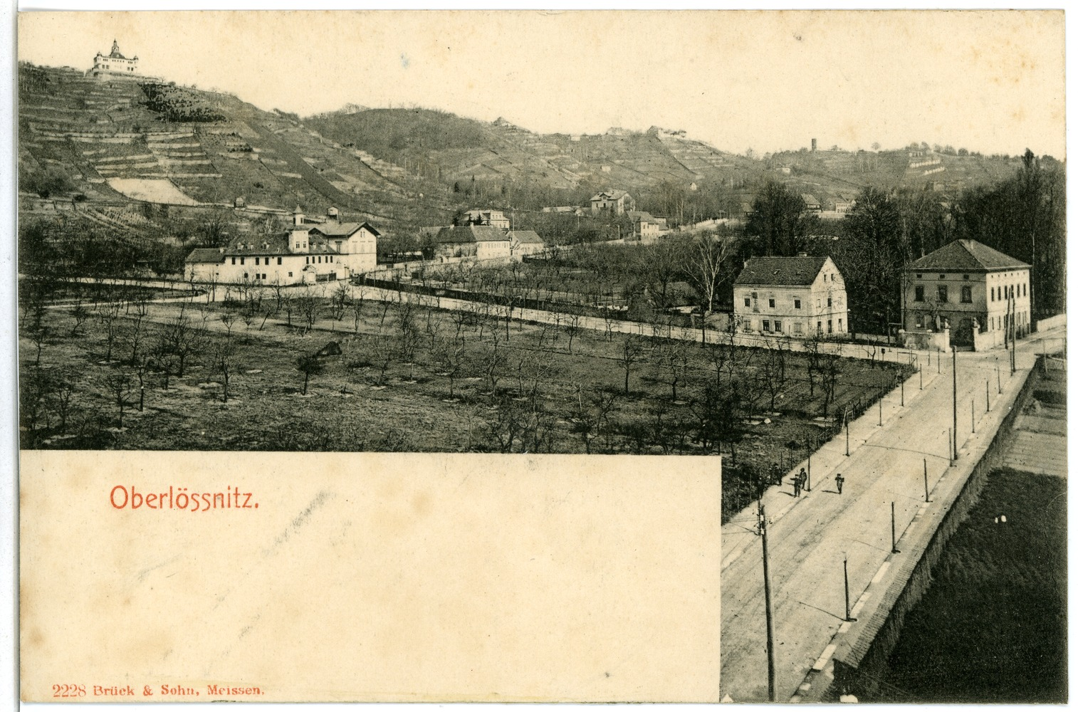 Oberlößnitz; Blick auf Oberlößnitz This postcard is from publisher Brück & Sohn in Meißen ( postcard has a unique number 02228 and is available in a higher resolution at the publisher. This images was uploaded in a cooperation project between Wikipedians and the publisher.